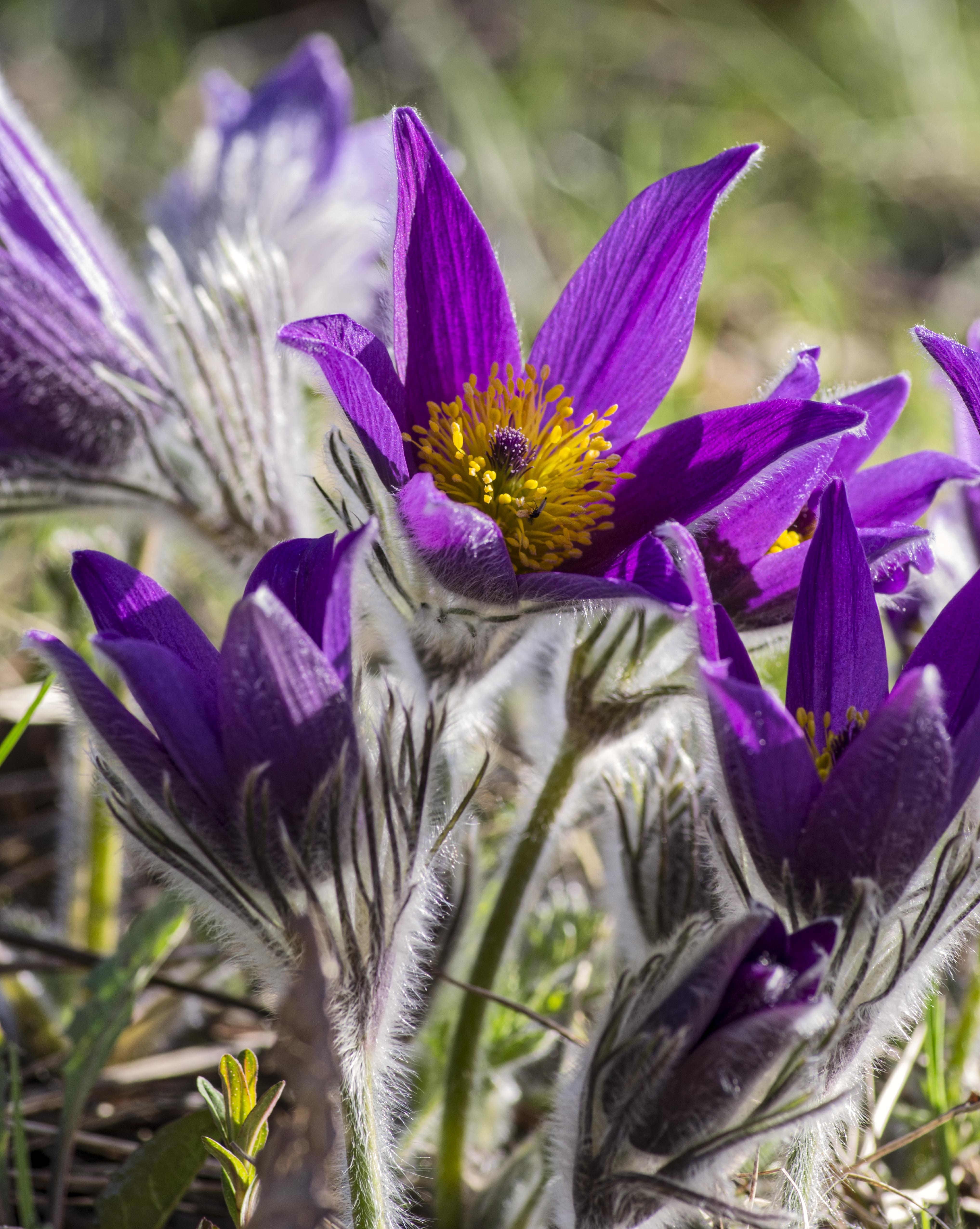 Bilder aus Ihringen am Kaiserstuhl Bilder aus dem Liliental Küchenschellen